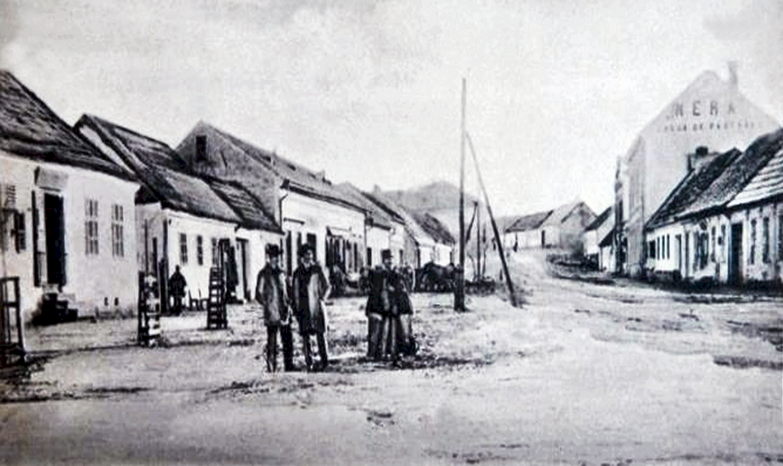 Bozovici, Bad-Herkulaner-Str. um 1900